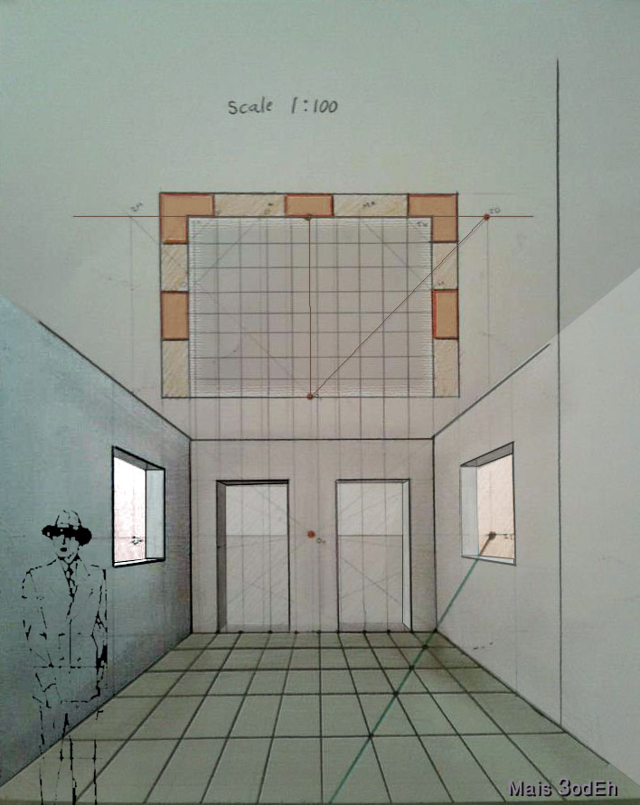 prospettiva a quadro verticale centrale vista dall'interno